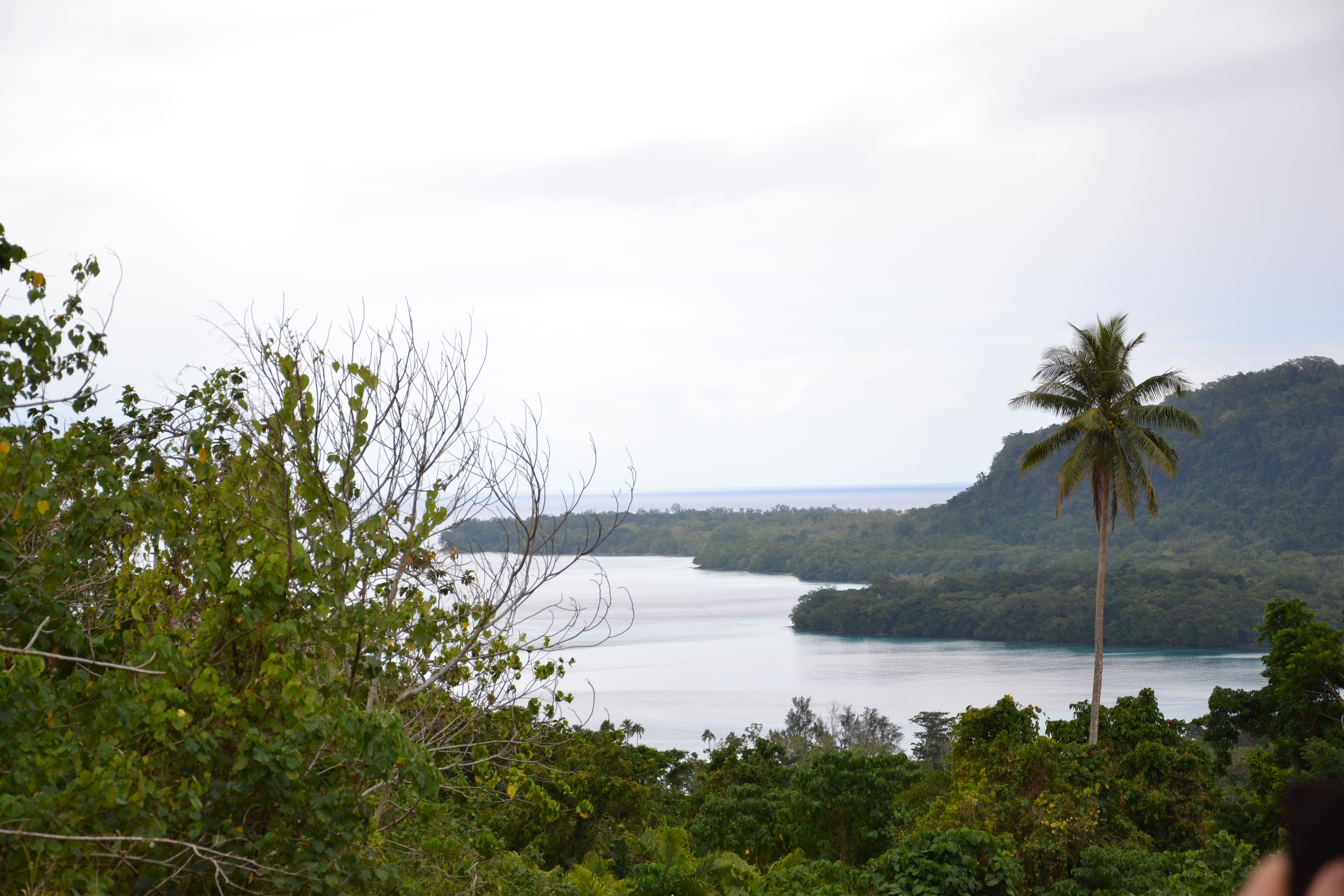 Espiritu Santo